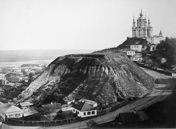 Андреевский спуск и Андреевская церковь. Шестидесятых годов XIX века. Фотограф: Франц де Мезер.